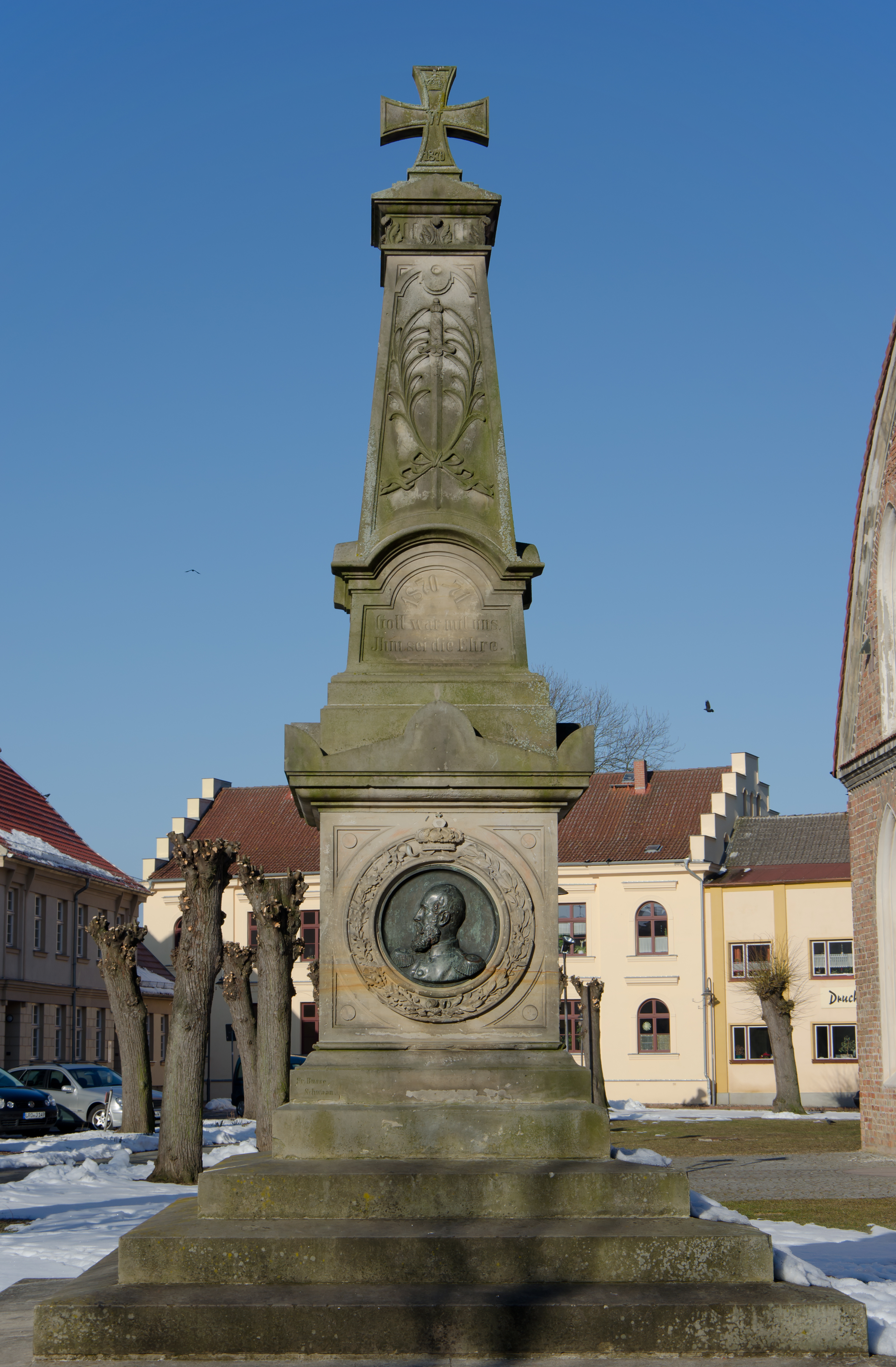 Schwaan Denkmal 1871